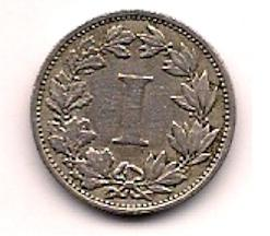 Moneda de 1 centavo acuñada en México entre 1882 y 1883. La emisión de monedas de níquel en sustitución de las de cobre y plata circulantes de aquel entonces ocasionó una crisis económica en el país.